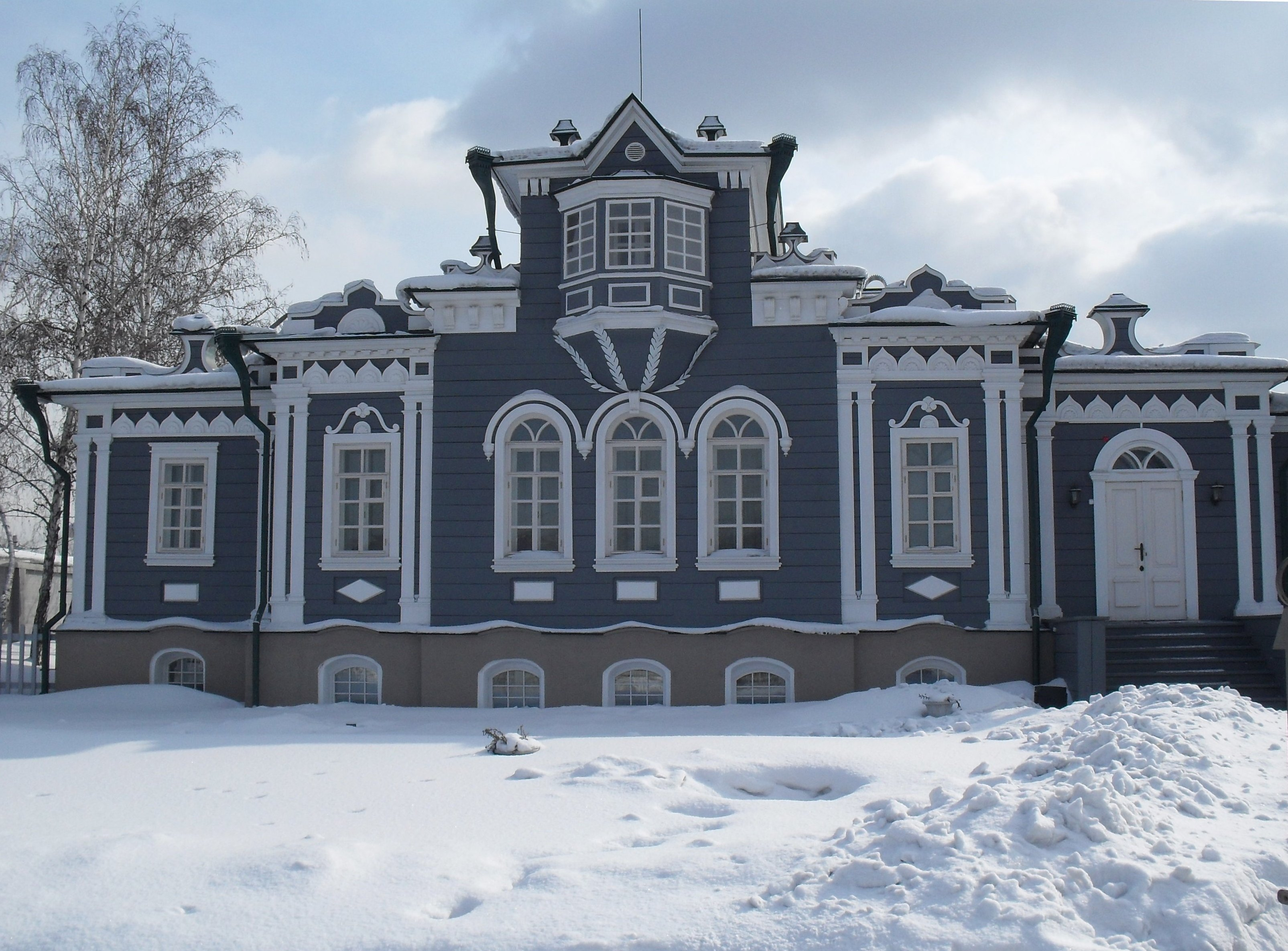 Иркутск. Иркутск. Дом князя С. П. Трубецкого (1854). С 1970 - музей декабристов.